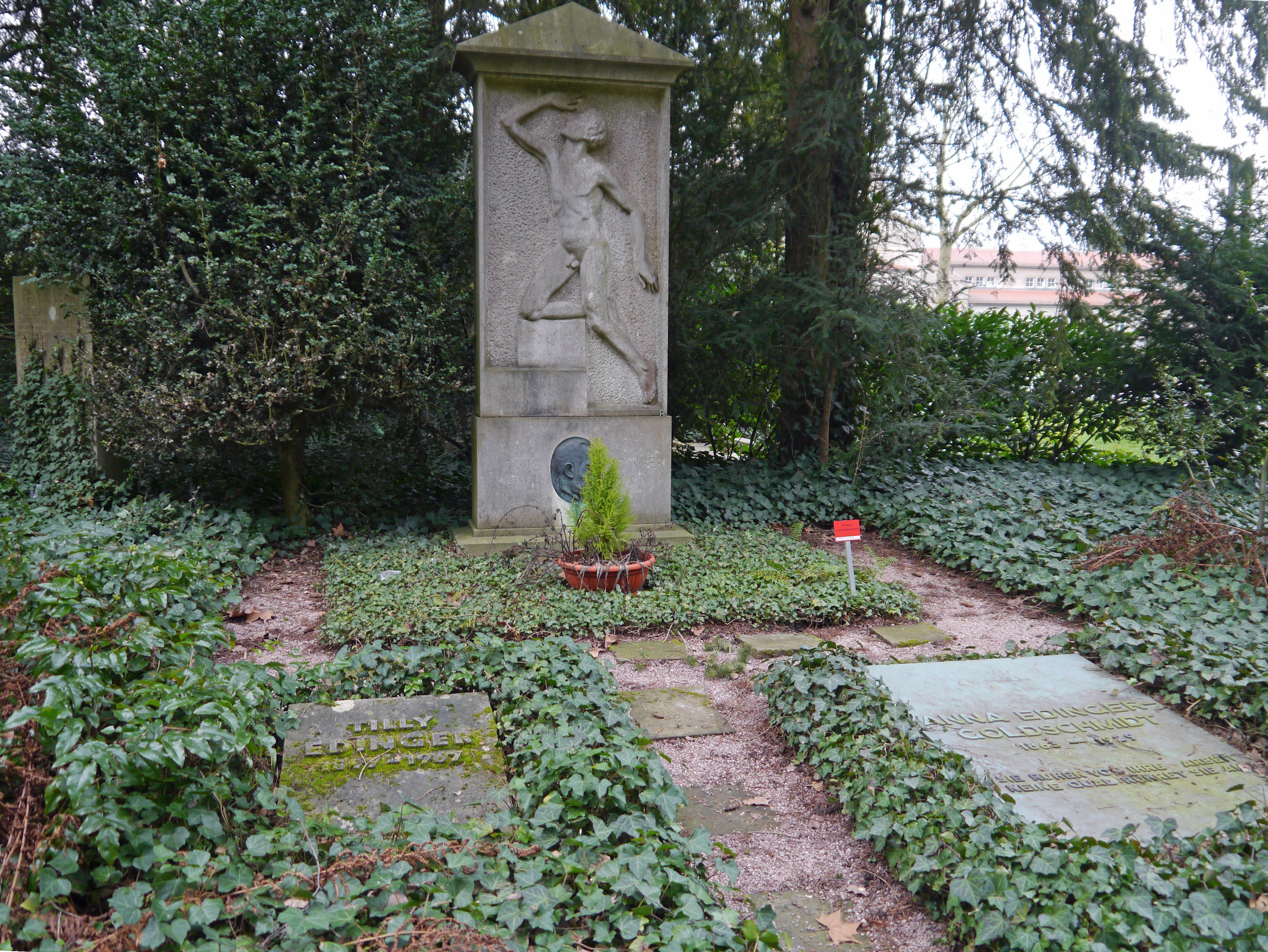 Grab von Tilly und Ludwig Edinger, sowie Anna Edinger-Goldschmidt auf dem Frankfurter Hauptfriedhof.